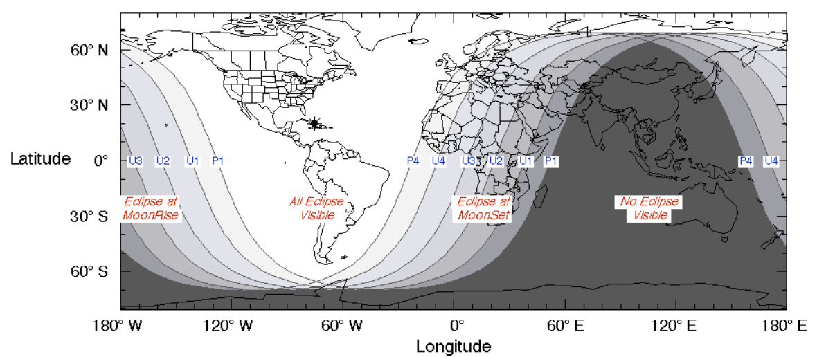 Visibilidad eclipse 21 enero de 2019